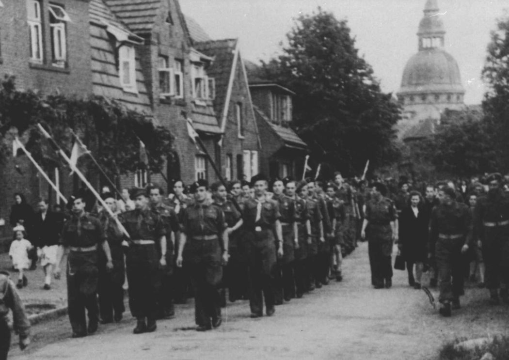 Polish troops in Germany